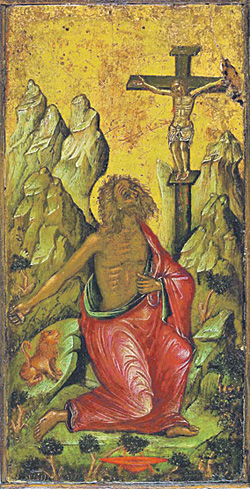 Saint Jerome.